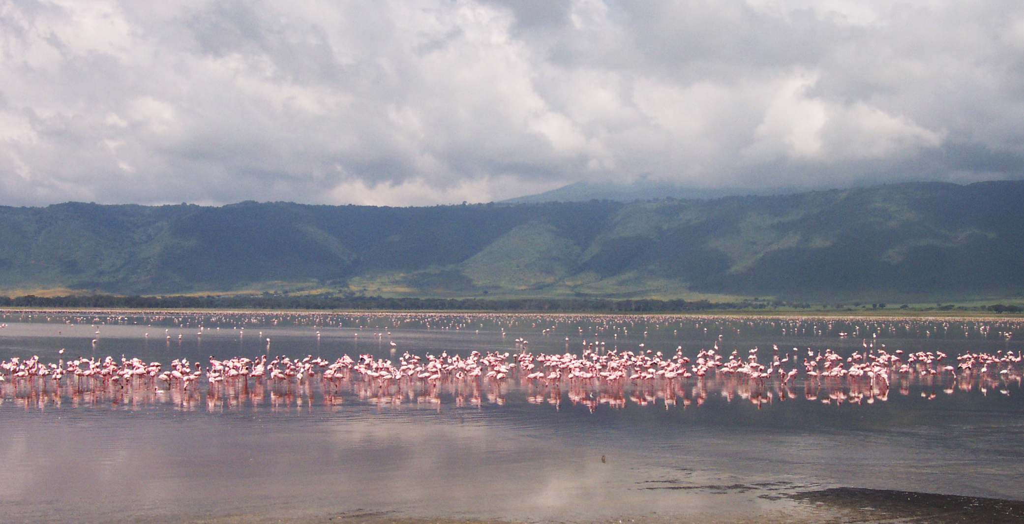 Flamant nain dans le cratére Ngorongoro Tanzanie